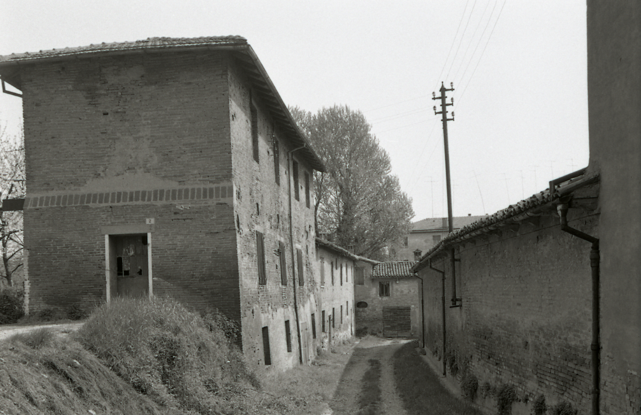 Imola (territorio). Canale dei Molini: vista del canale e delle case che vi si affacciano. Ricerche personali?: particolare legno. Servizio fotografico : Imola, 1974 / Paolo Monti. - Strisce: 6, Fotogrammi complessivi: 29 : Negativo b/n, gelatina bromuro d'argento/ pellicola ; 35 mm. - ((Sul portanegativi: N[I]K[MA]T FP4. - N.B. Possibile sottoserie (1):. - 19-20 Ricerche personali. - Occasione: Documentazione per la pubblicazione: Varignana Franca, 2, "Mappe agricole e urbane del territorio bolognese dei secoli 17. e 18" in "Le collezioni d'arte [...]", Bologna, Cassa di Risparmio di Bologna-Edizioni Alfa, 1974. - Fonte: Agenda di Paolo Monti: Leica 1501-3000 Controllo numerazione (1950-1978), presso Archivio Paolo Monti. - Fonte: Monografia di Varignana Franca (a cura di): 2, Mappe agricole e urbane del territorio bolognese dei secoli 17. e 18 in Le collezioni d'arte della Cassa di Risparmio in Bologna, Bologna, Cassa di Risparmio di Bologna-Edizioni Alfa (1974). - Fonte: Fattura di Paolo Monti: IV. Commesse/ Fattura n. 13 (1974/06/24), presso Archivio Paolo Monti